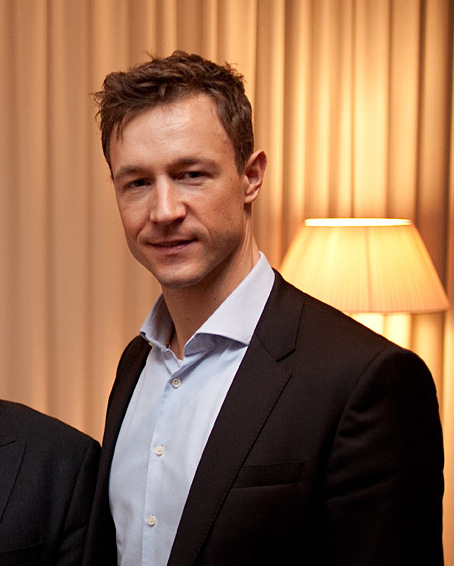 Film-Empfang im Rahmen der Berlinale 2018, Botschaft Berlin